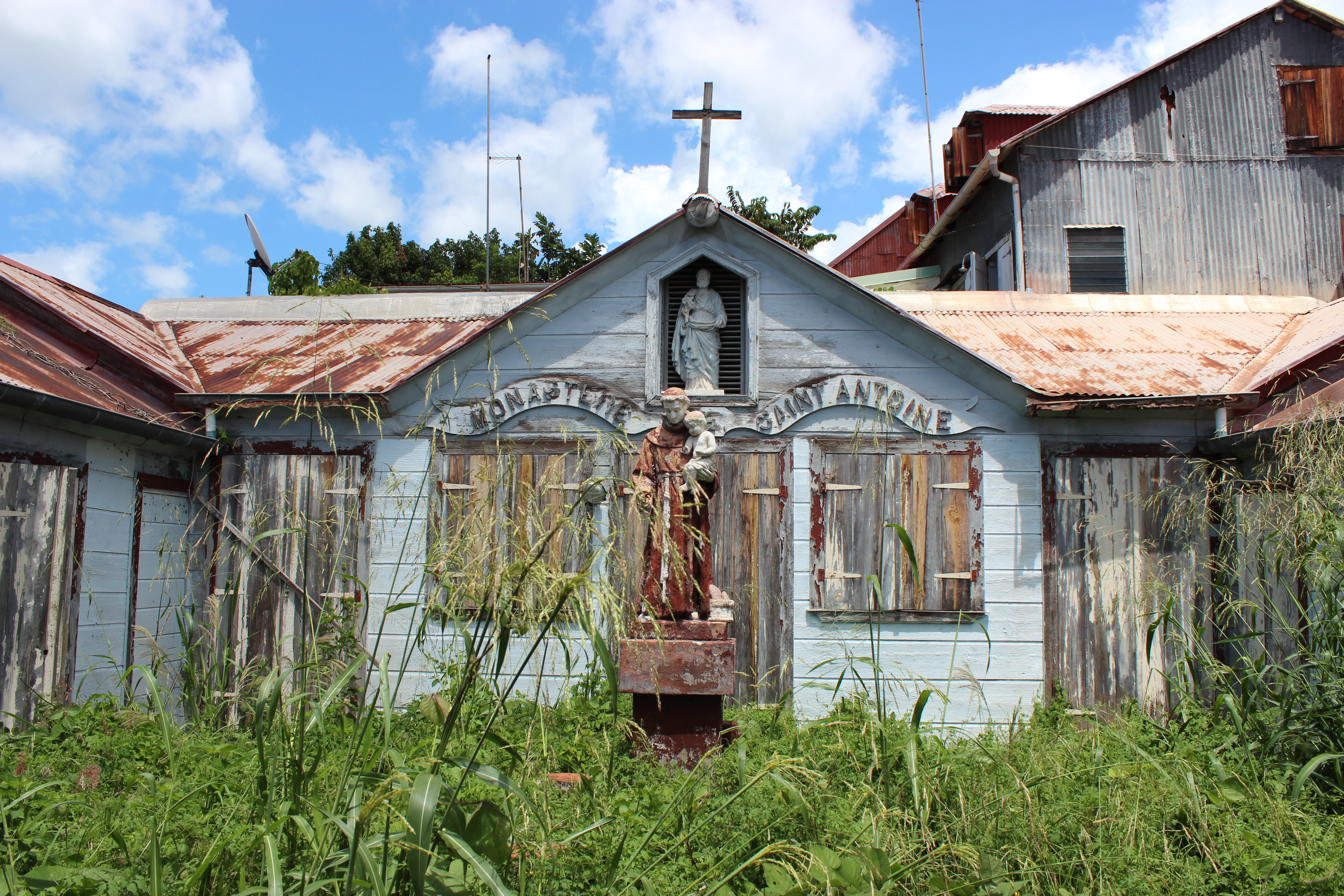 Monastère Saint-Antoine (Inscrit) .